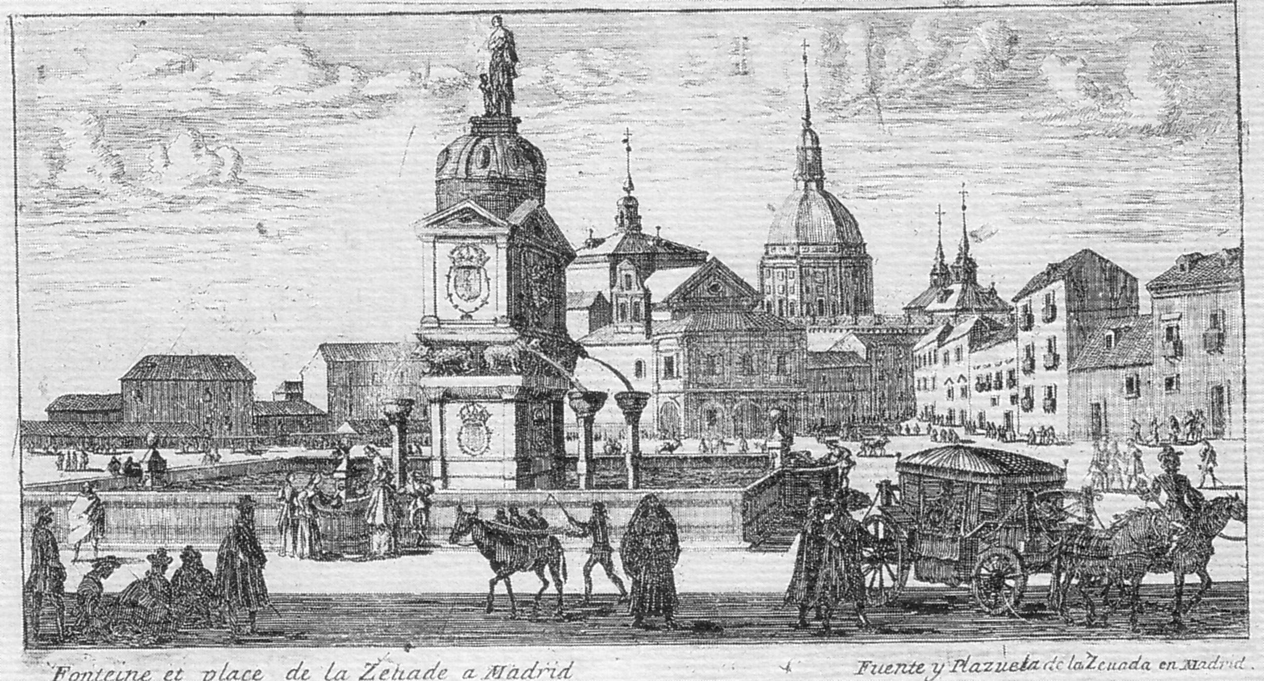 Vista de la Plaza de la Cebada de Madrid desde el sur, con la 'fuente de la Abundancia' o 'fuente de la plaza de la Cebada' que entre 1618-1840 estuvo en ese entorno del viejo Madrid, tradicional espacio de mercado, al que llegaban los arrieros por la vecina Puerta de Moros a comerciar sus mercancías, precedente del mercado de la Cebada construido en 1868. Cobre, talla dulce (138 x 241 cm.)